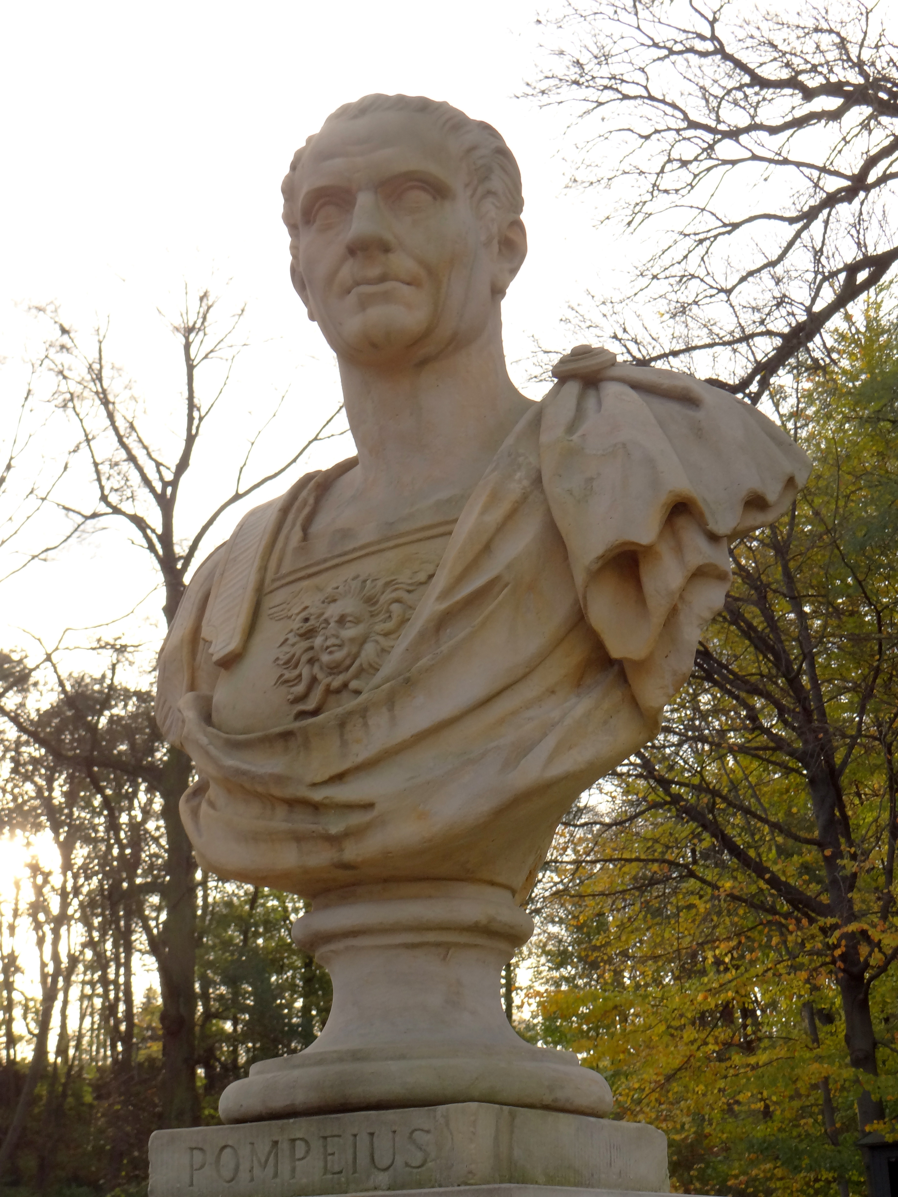 Rzeźba na terenie Starej Pomarańczarni w warszawskich Łazienkach Królewskich - popiersie Pompejusza